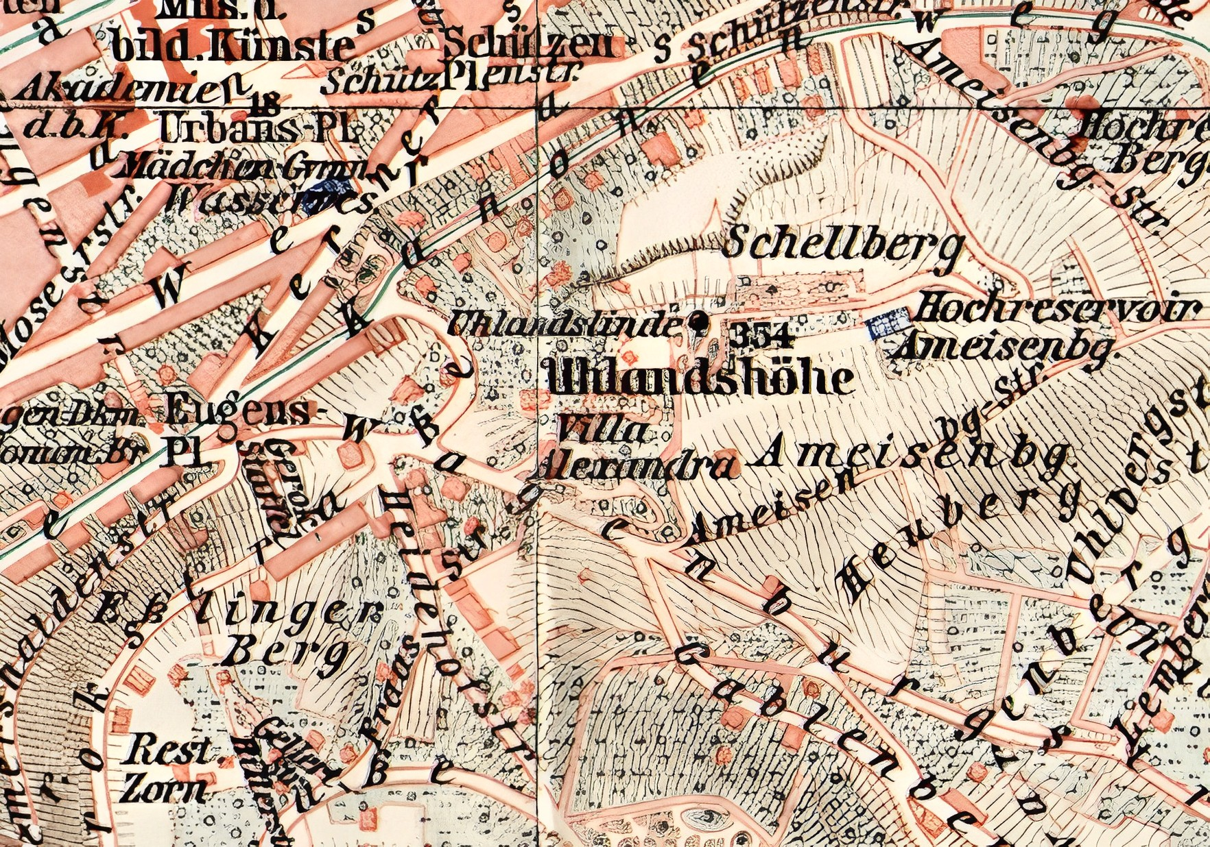 Plan der Stadt Stuttgart, Ausschnitt mit der Gegend um die Uhlandshöhe, 1909.